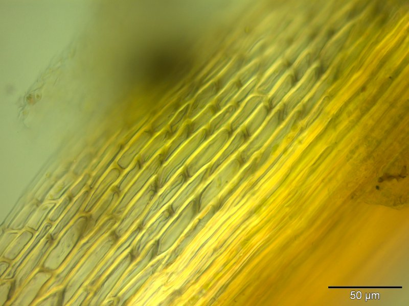 Torf-Krummstielmoos (Campylopus pyriformis), Laminazellen am Blattgrund, Vergerößerung: 400x